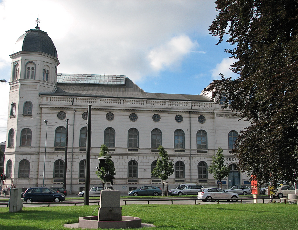 Beschreibung: Das Schiffahrtsmuseum in Rostock / Germany Fotograf: Darkone, 17. August 2005